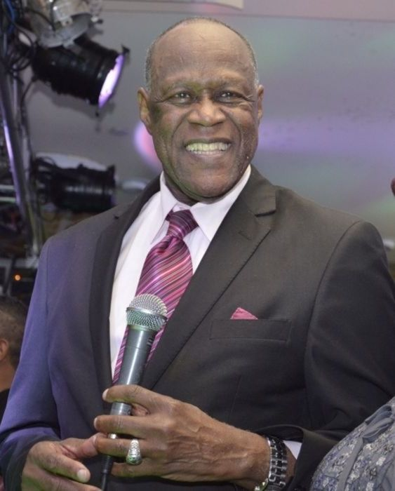 Johnny Ventura merenguero dominicano.